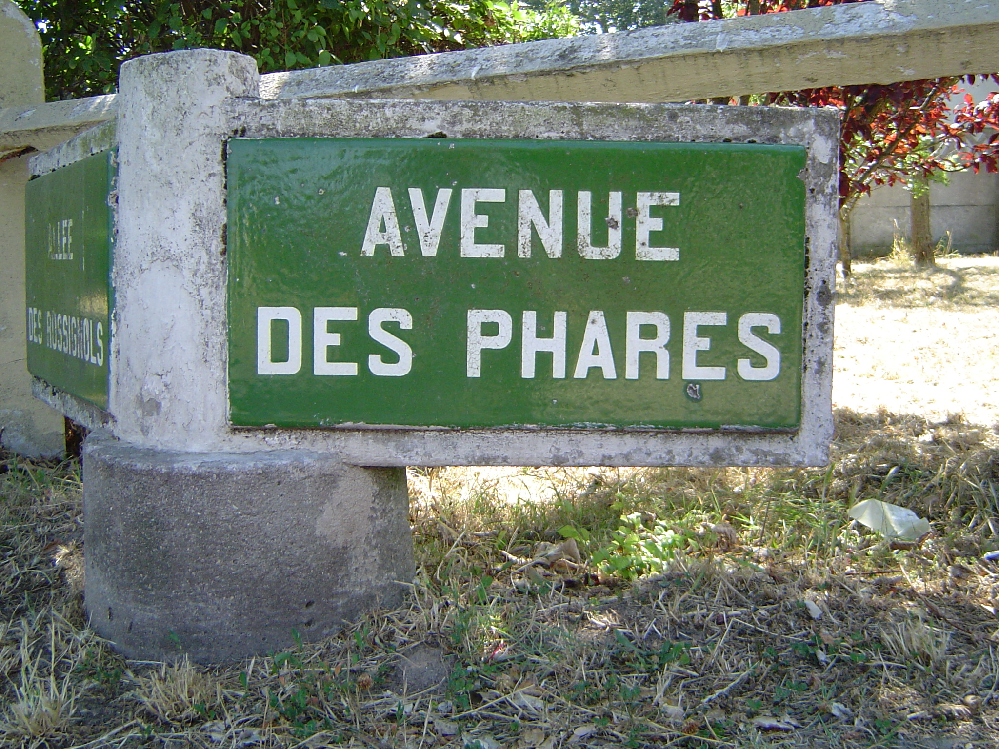 Photos de plaques de rues prises dans la commune du Touquet-Paris-Plage